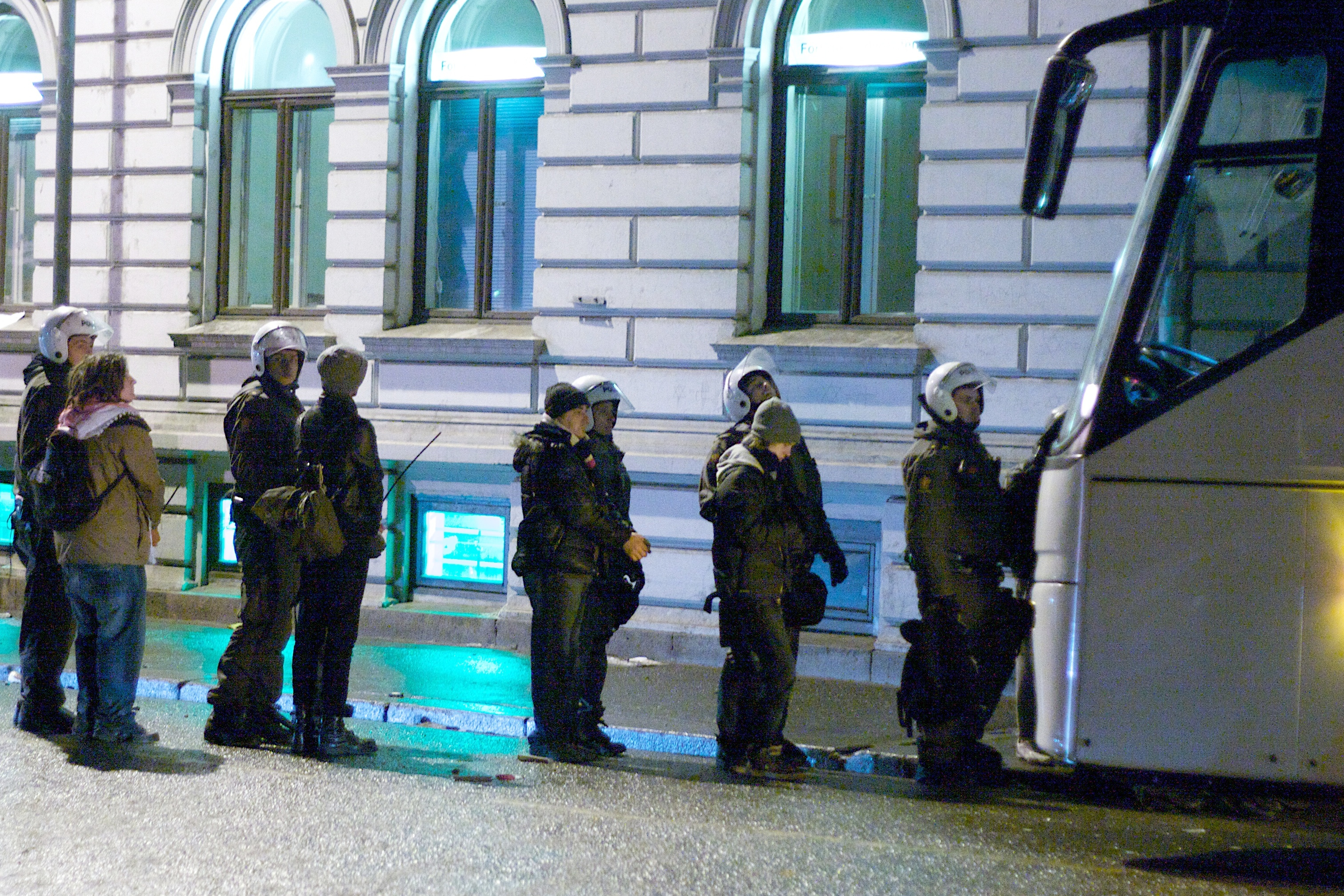 Arrestanter under de pro-palestinske opptøyene i Oslo 10. januar 2009.